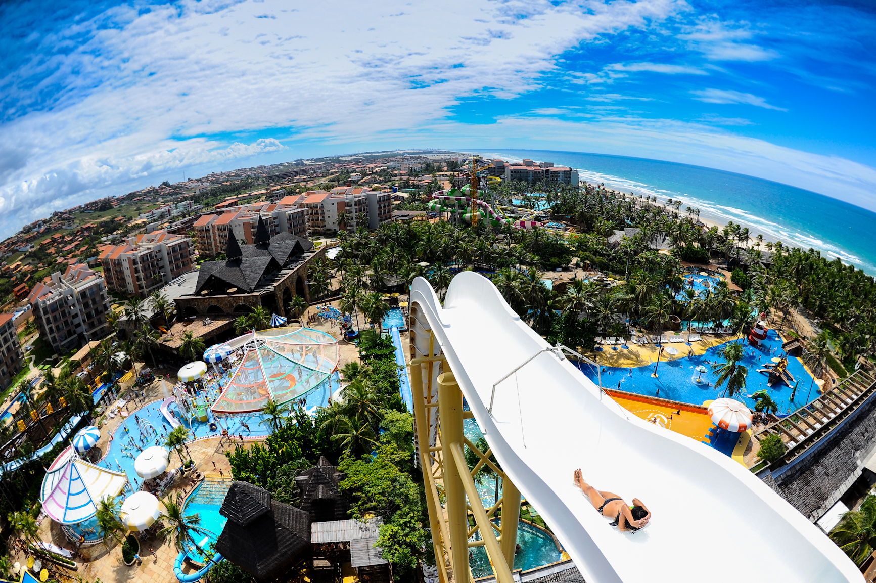 Melhor parque aquático da América Latina.